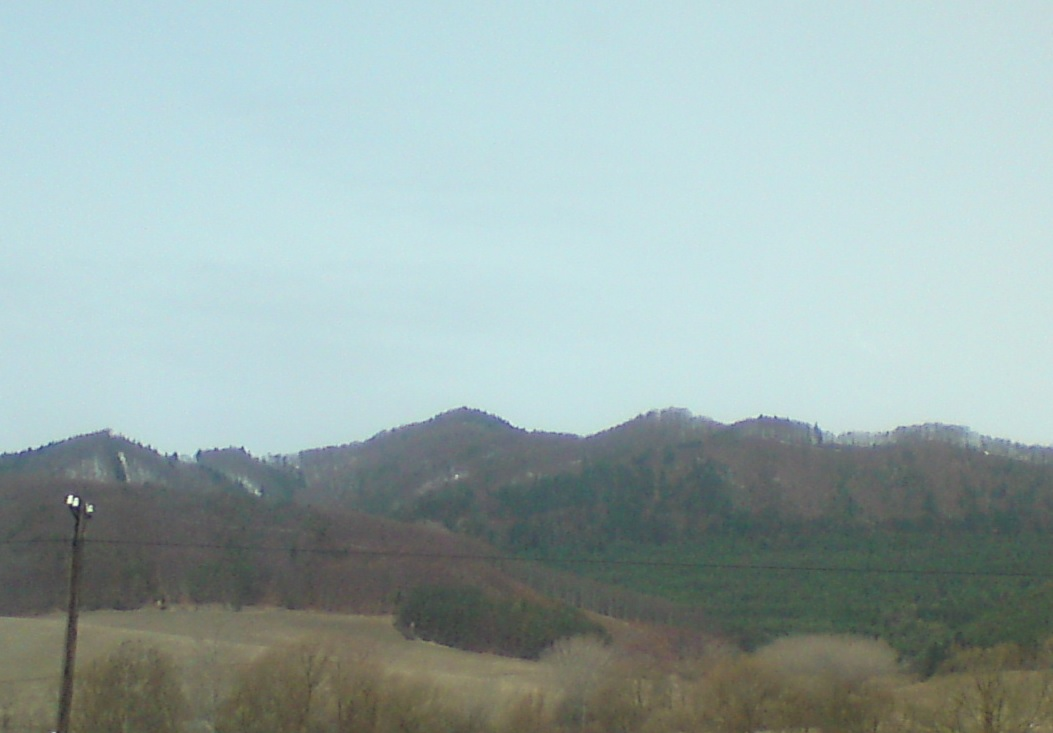 Žibrid z Rajeckej doliny